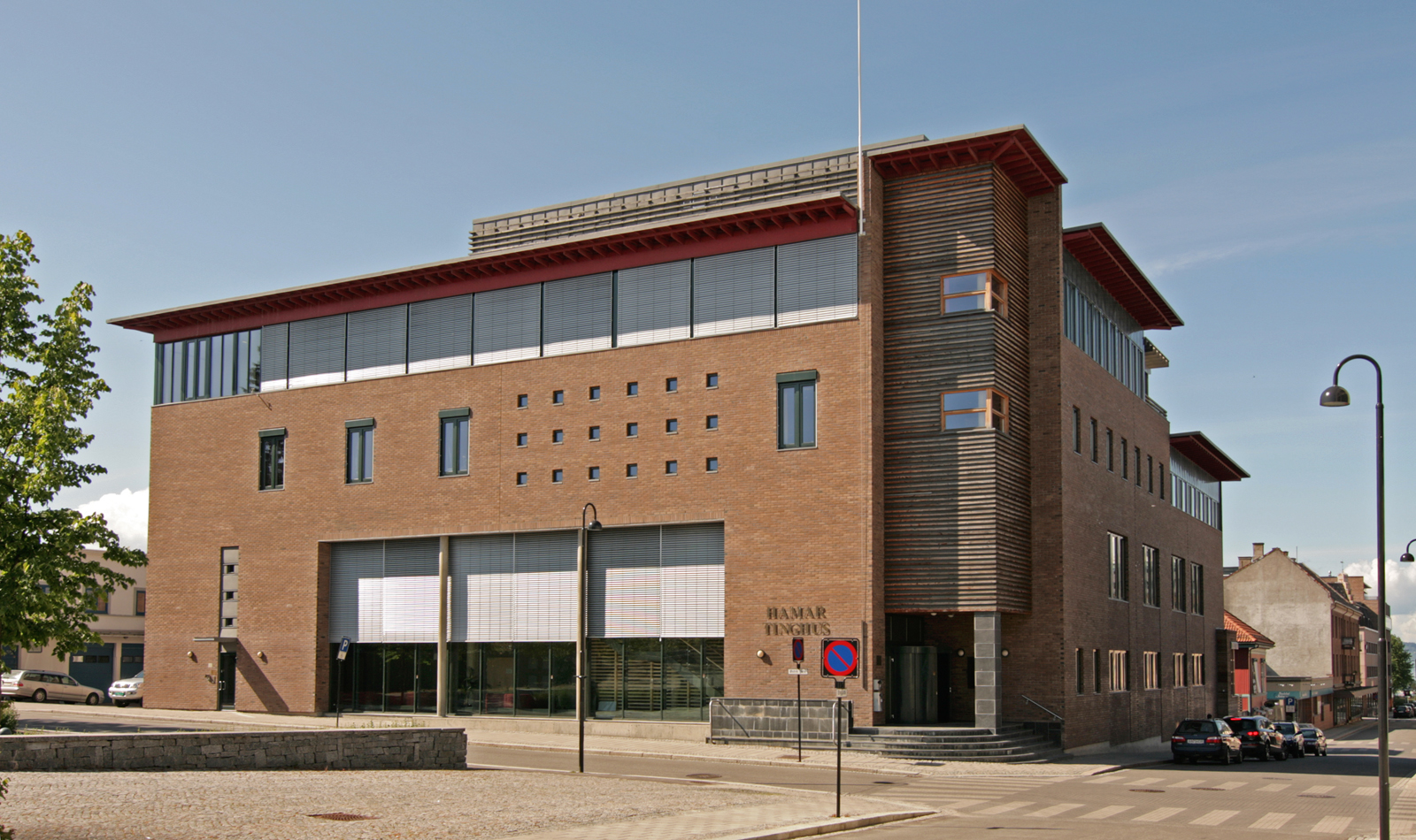 Hamar tinghus, sete for Eidsivating lagmannsrett. Bygd 1999. Arkitekter: Anderssen og Fremming AS.